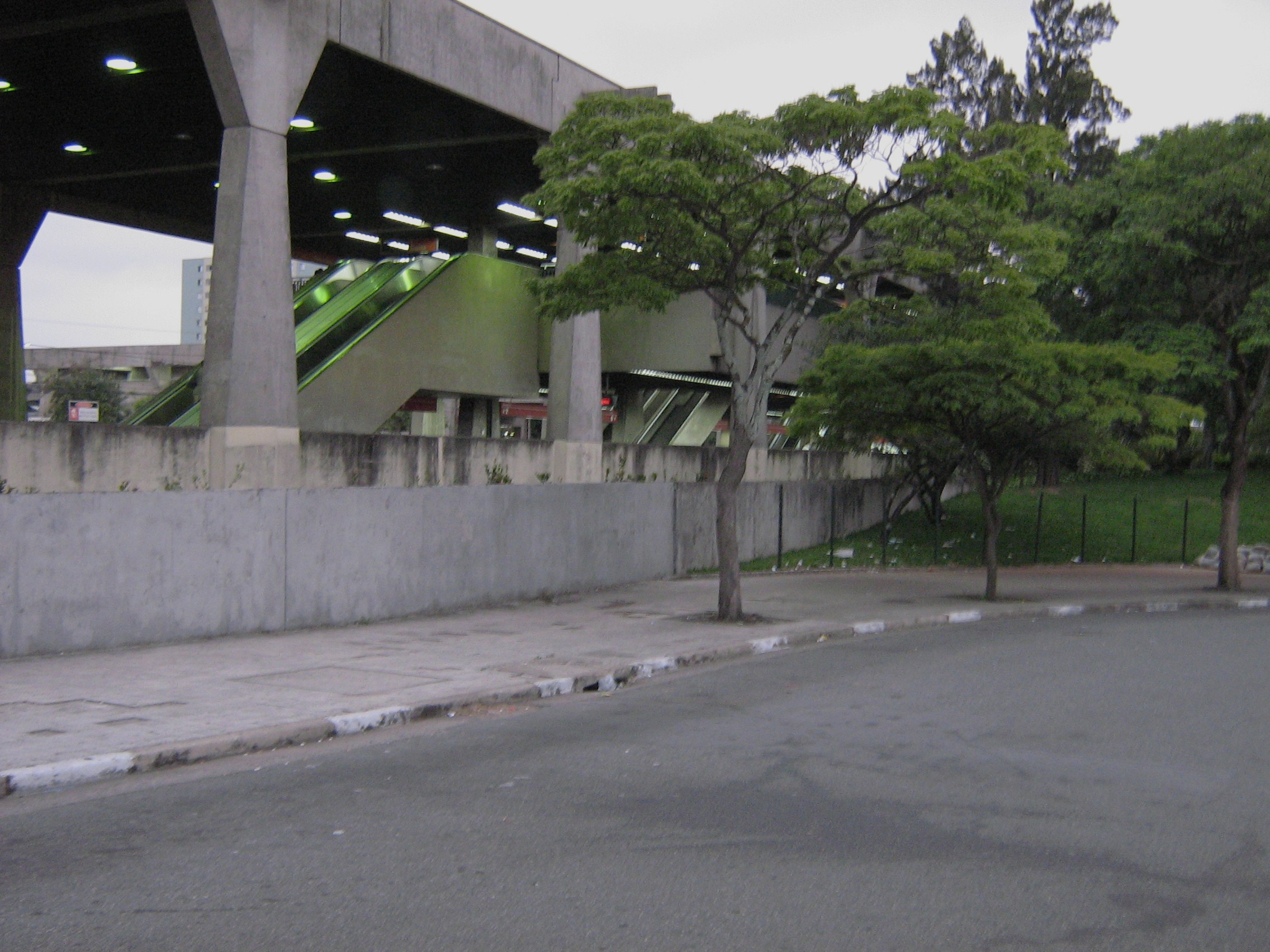 Brás, São Paulo - State of São Paulo, Brazil